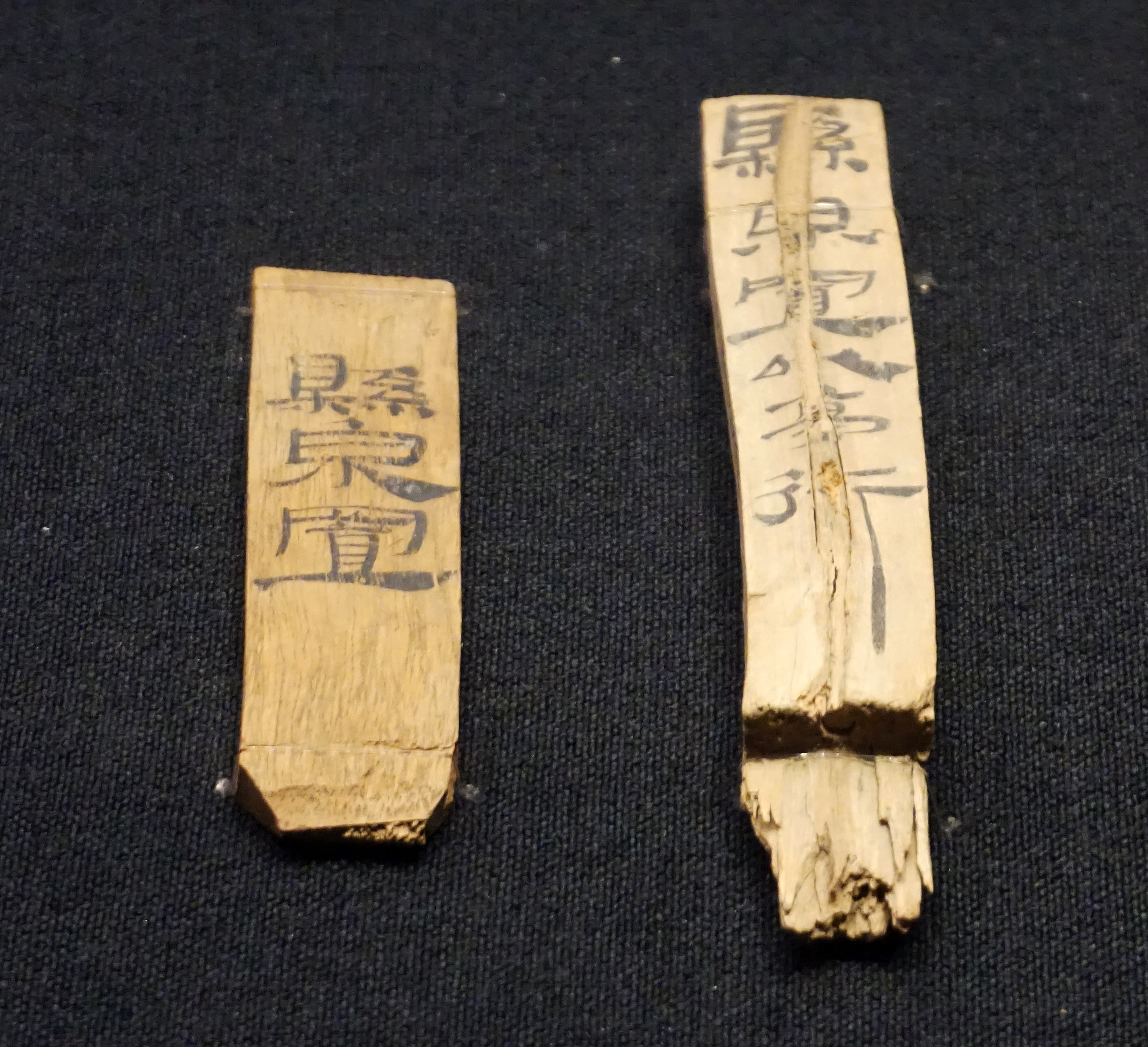 悬泉置封检，敦煌市悬泉置出土。甘肃省博物馆藏。